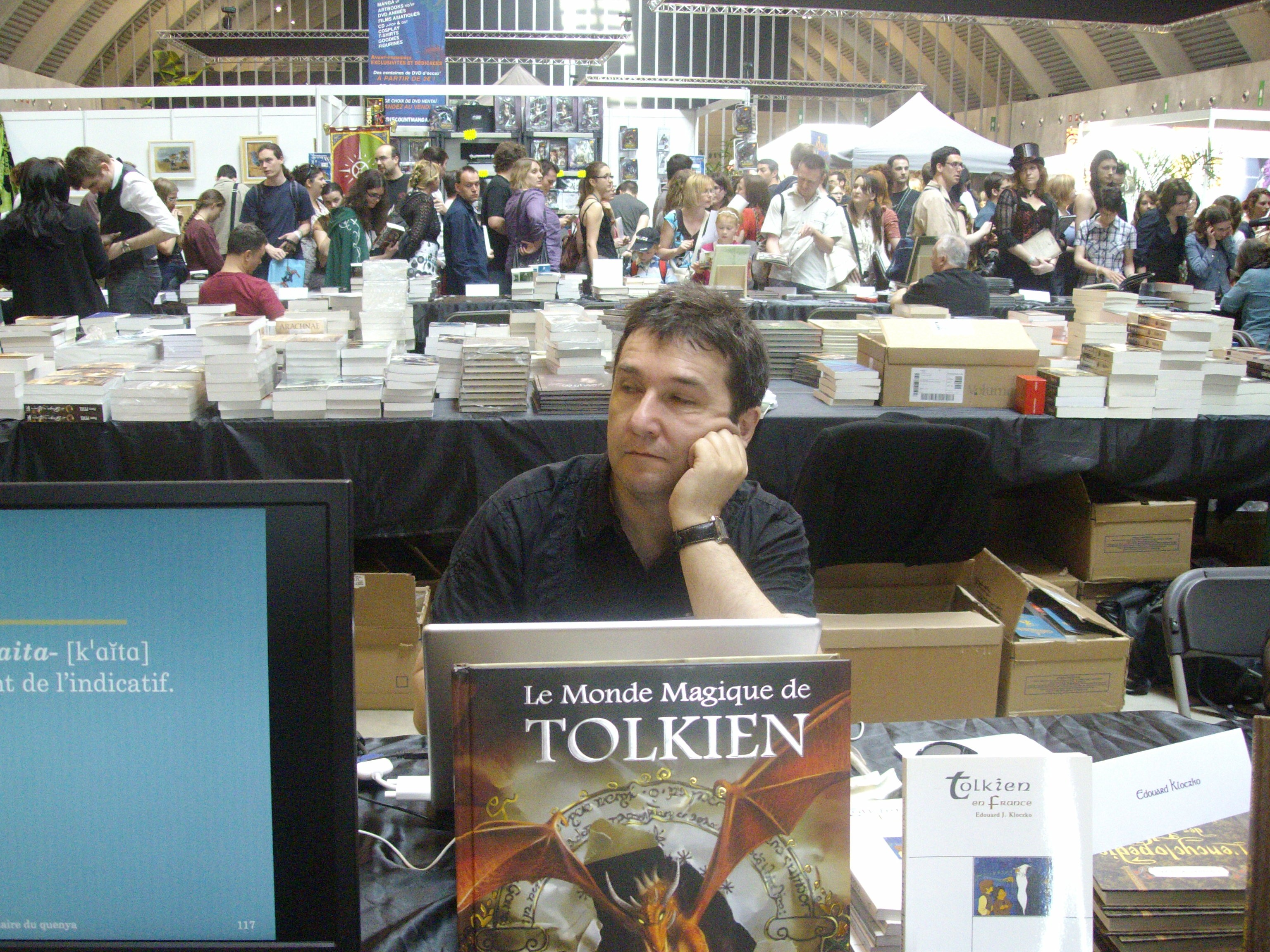 Édouard Kloczko au festival Trolls et légendes de Mons